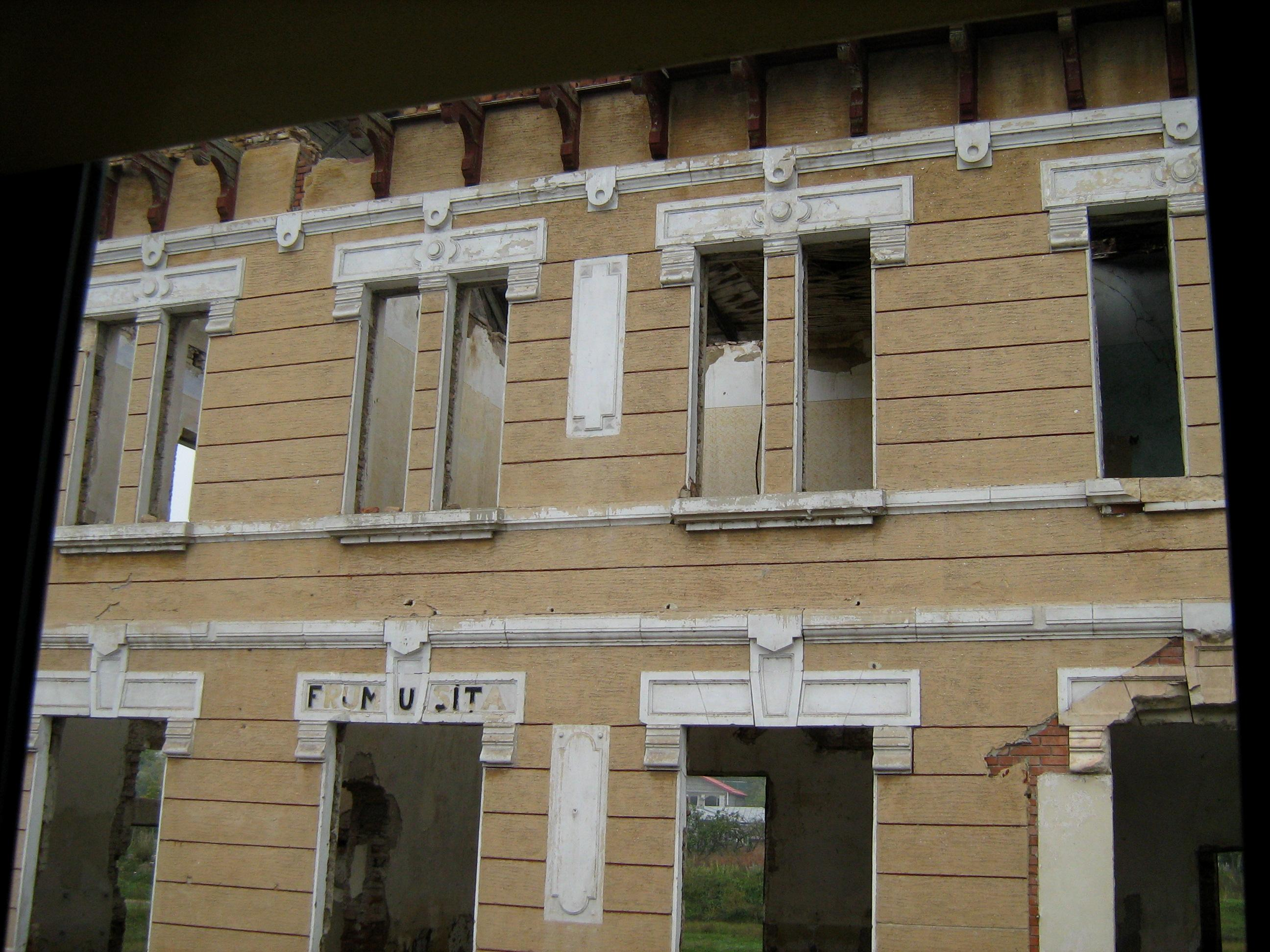 Gara de la Frumusita, jud.Galati